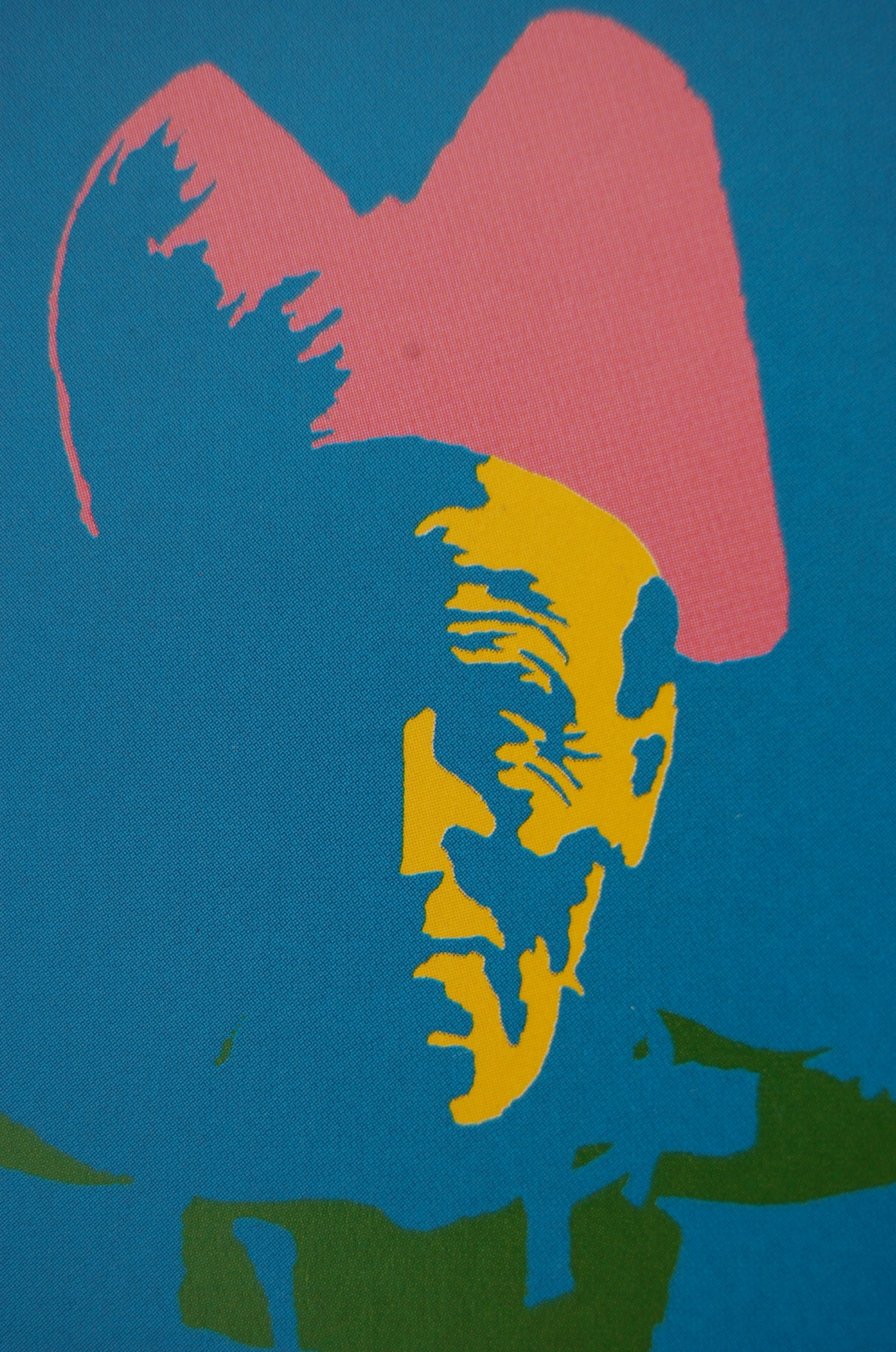 photo d'une des multiples Mamm Gozh, la Marylin du Hangar't